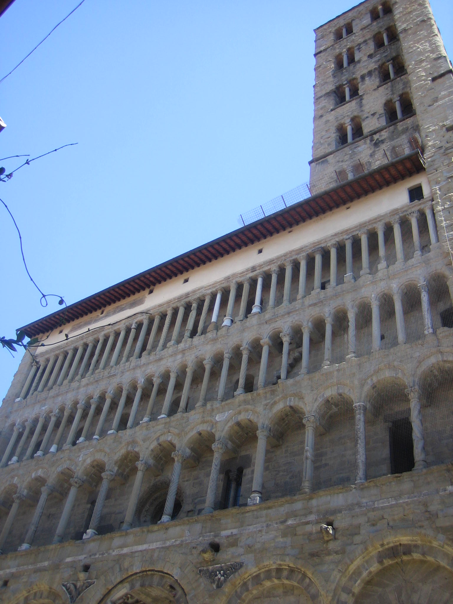 Santa Maria della Pieve in Arezzo (Toskana)